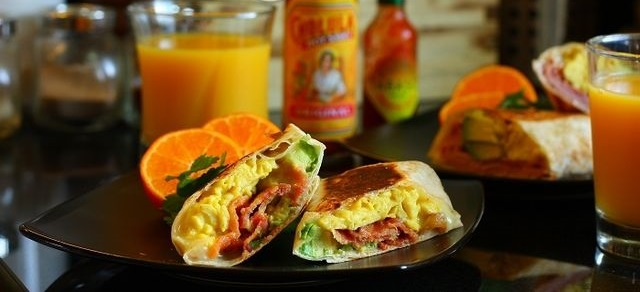 サンディエゴで一般的なモーニングブリート（卵、アボカド、チーズ、ベーコン）